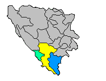 Подјела Херцеговине у Босни и Херцеговини